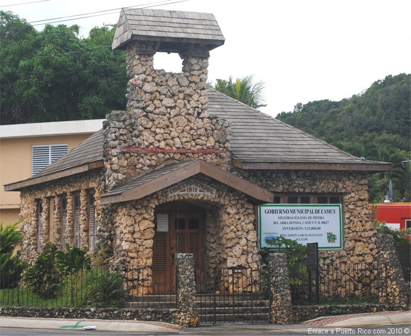 Construida en 1912 por el arquitecto norteamericano Albert Munson. La misma fue declarada como monumento histórico en 1990 por el Instituto de Cultura Puertorriqueño. Está ubicada en la carretera #486 en el barrio Abra Honda de Camuy. Información sobre Camuy en